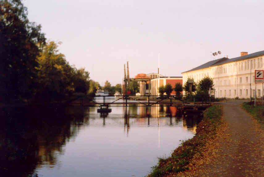 Motala verkstad, en bild tagen av Harri Blomberg i september 1992.